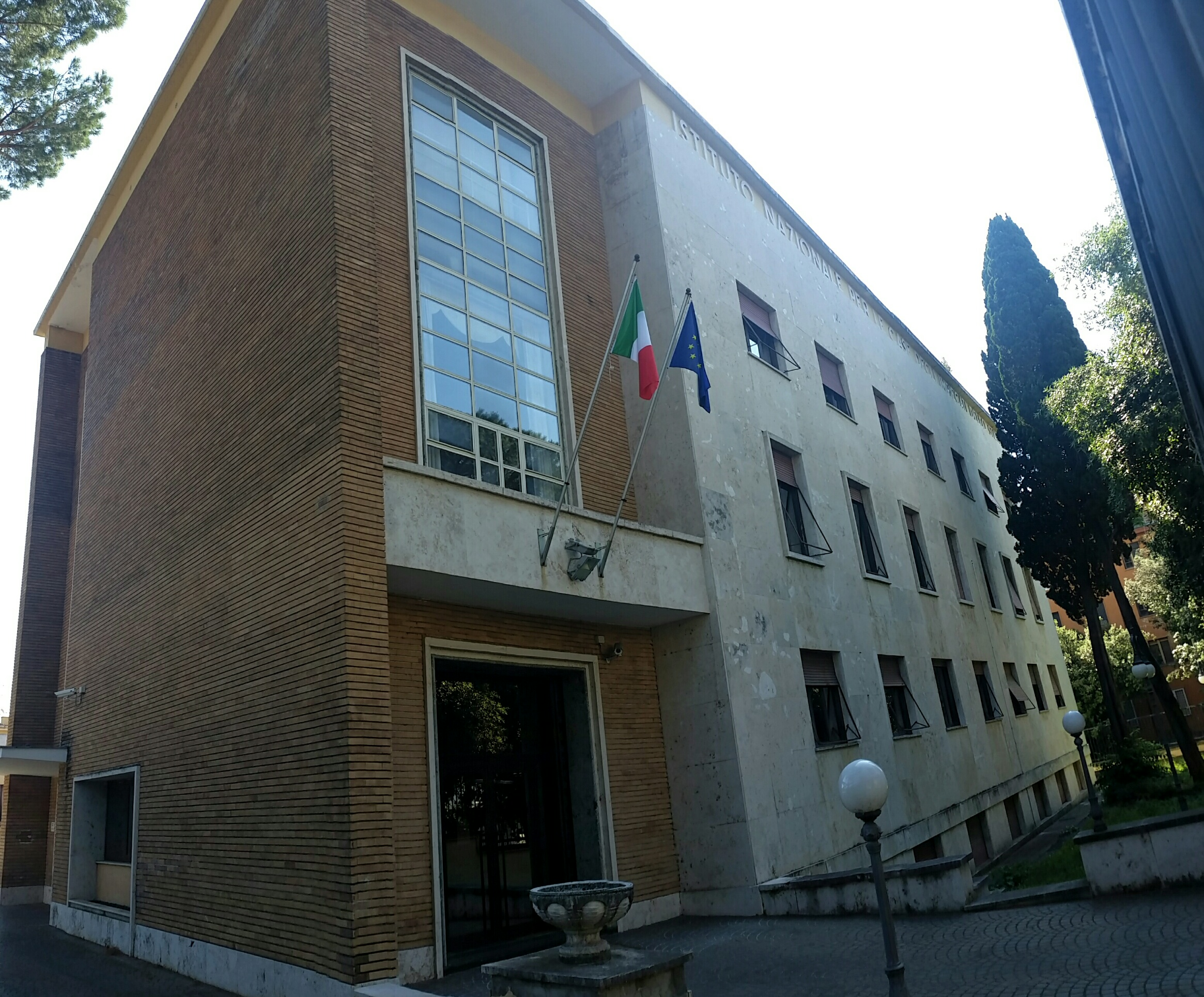 Sede INCIS in Roma, Via Lariana 15, oggi sede della RGS